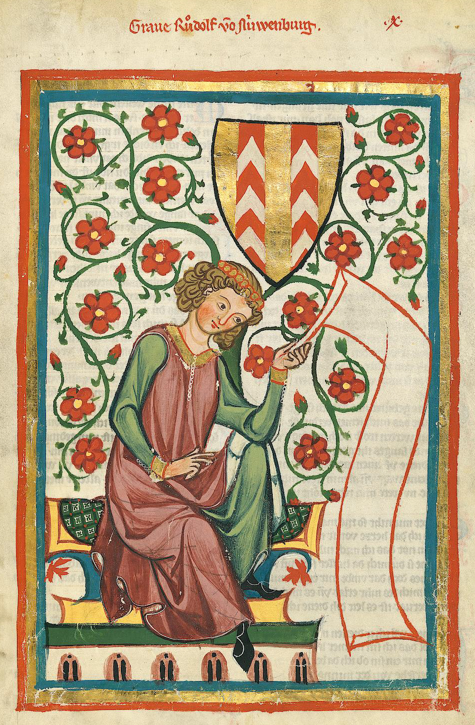 Codex Manesse, UB Heidelberg, Cod. Pal. germ. 848, fol. 20r: Graf Rudolf von Neuenburg